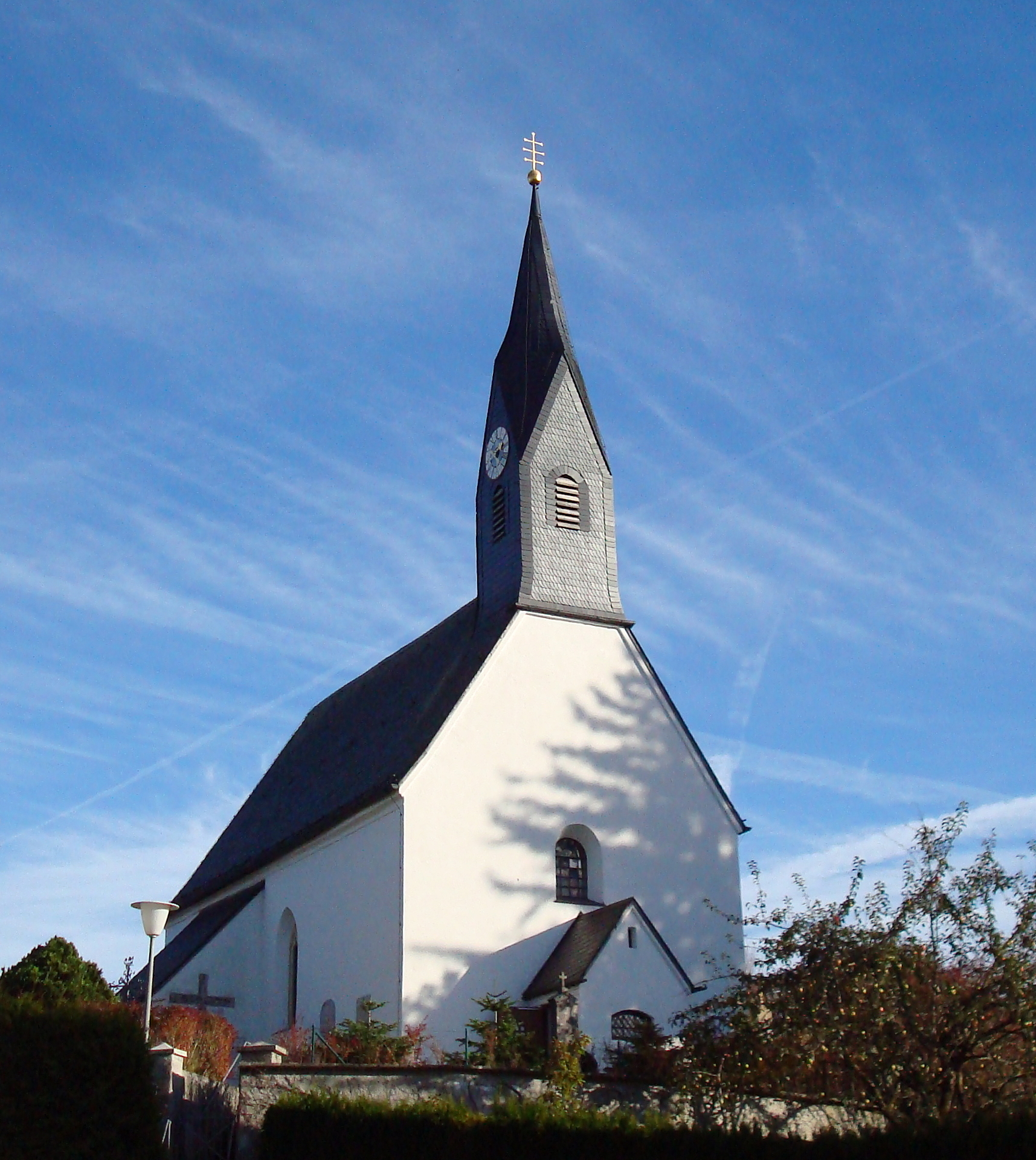 Starnberg, OT Percha, Kirche St. Valentin. Die kleine katholische Filialkirche kann auf die längste nachweisbare Geschichte unter den Sakralbauten im heutigen Starnberger Stadtgebiet zurückblicken. Eine erste Erwähnung geht auf das Jahr 785 zurück, eine Kirchenweihe anläßlich eines Neubaus ist für 1172 bezeugt. Um 1500 erfolgte ein Ausbau, und seit jener Zeit ist die Kirche, die in ihrem Innern auch einige wertvolle Kunstwerke aus der Spätgotik aufweist, in ihrem baulichen Bestand bis heute nahezu unverändert geblieben.[1] This is a photograph of an architectural monument.